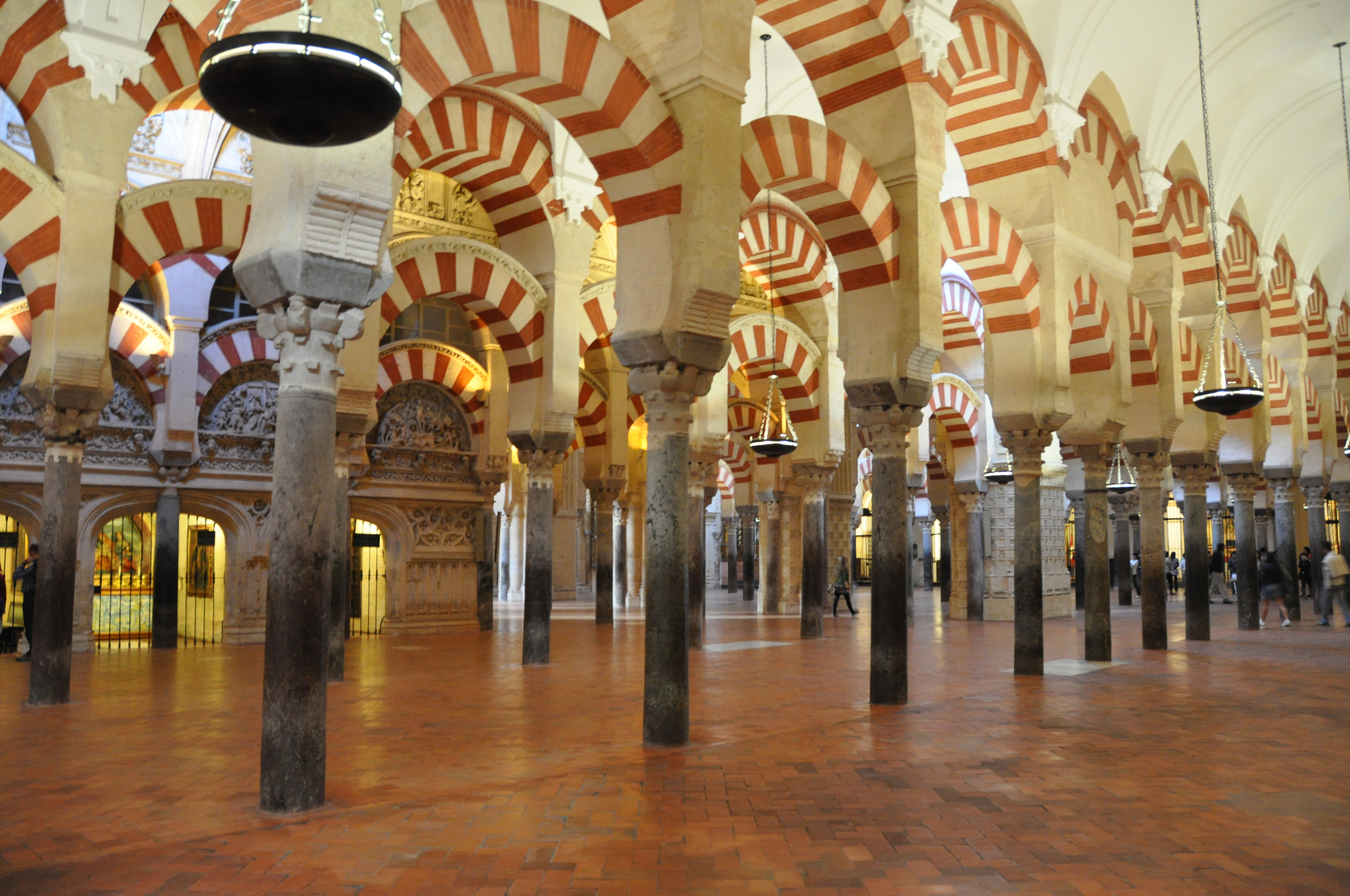 Arcos de la Mezquita de Córdoba